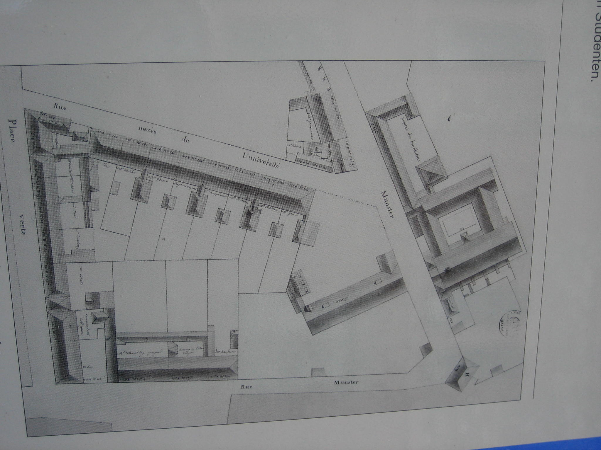 Lageplan von 1808 der Gegend um die «Rue neuve de l'université». Damals gehörte Mainz zu den Schlüsselstädten der französischen Republik.